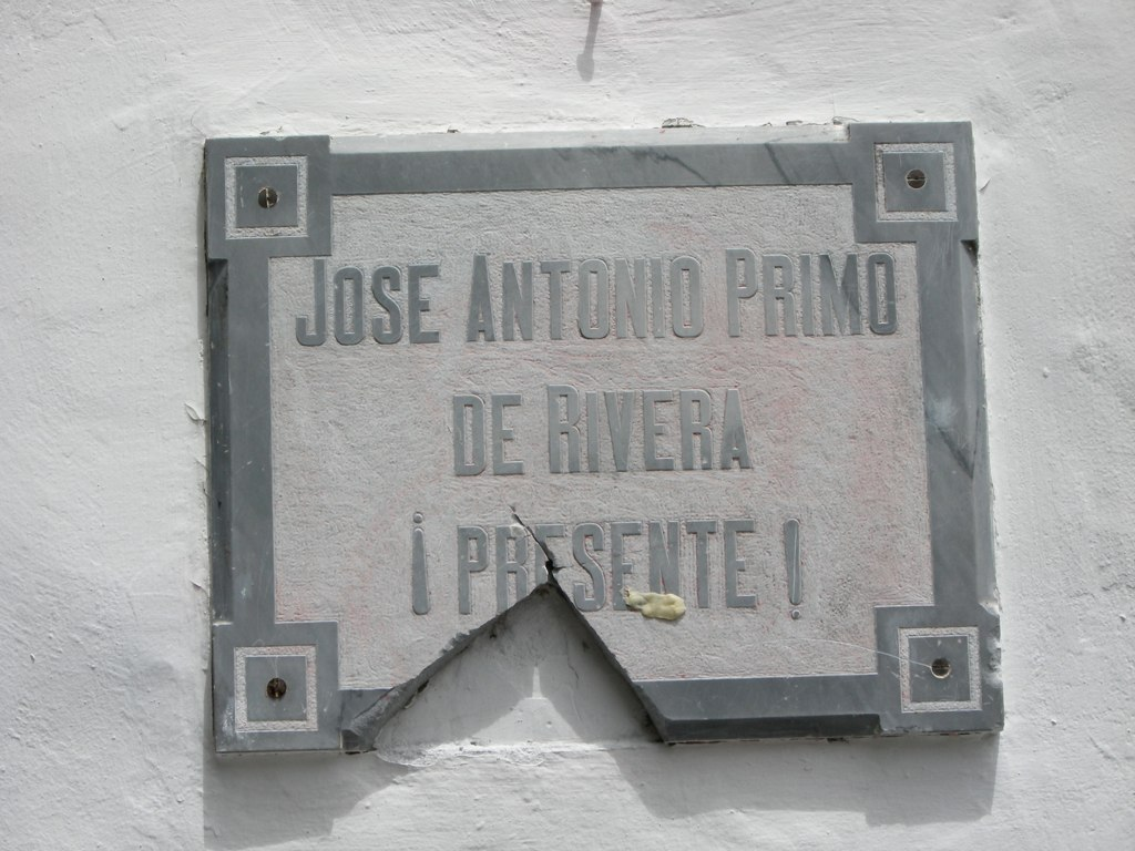 José Antonio ¡presente!